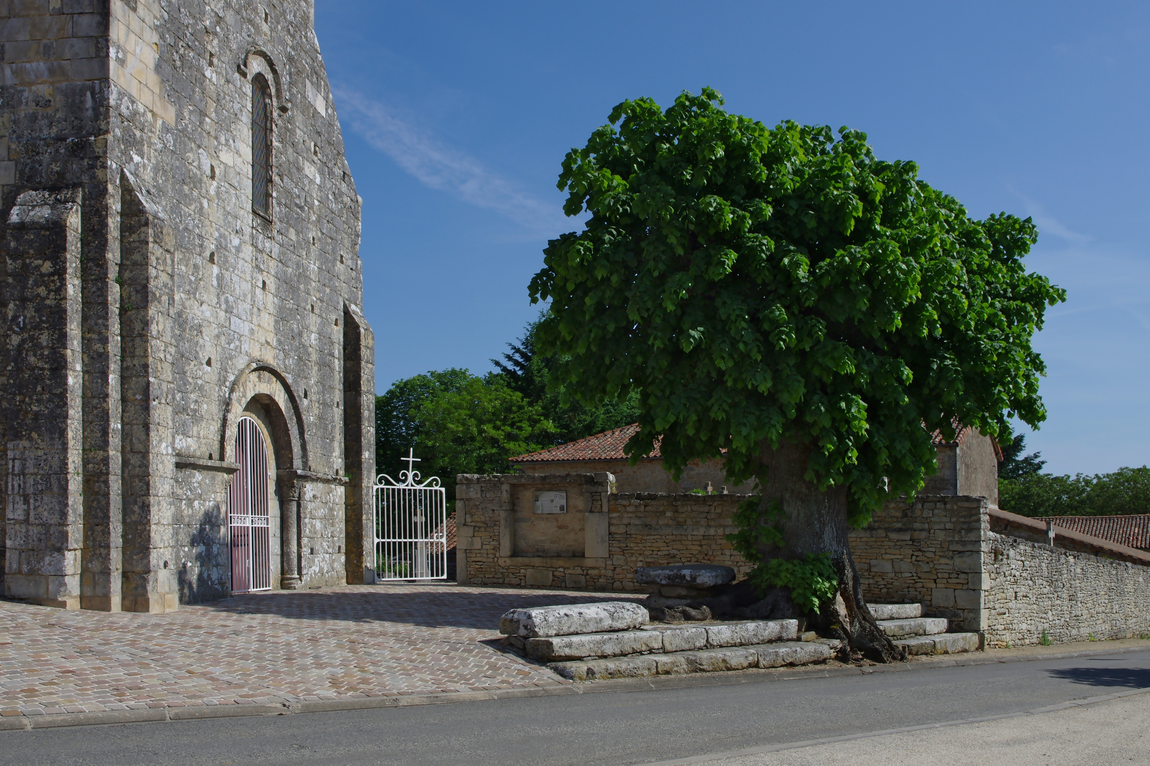 Eglise Saint-Pierre et tilleul dit "de Sully", Saint-Pierre-d'Exideuil, Vienne, France.